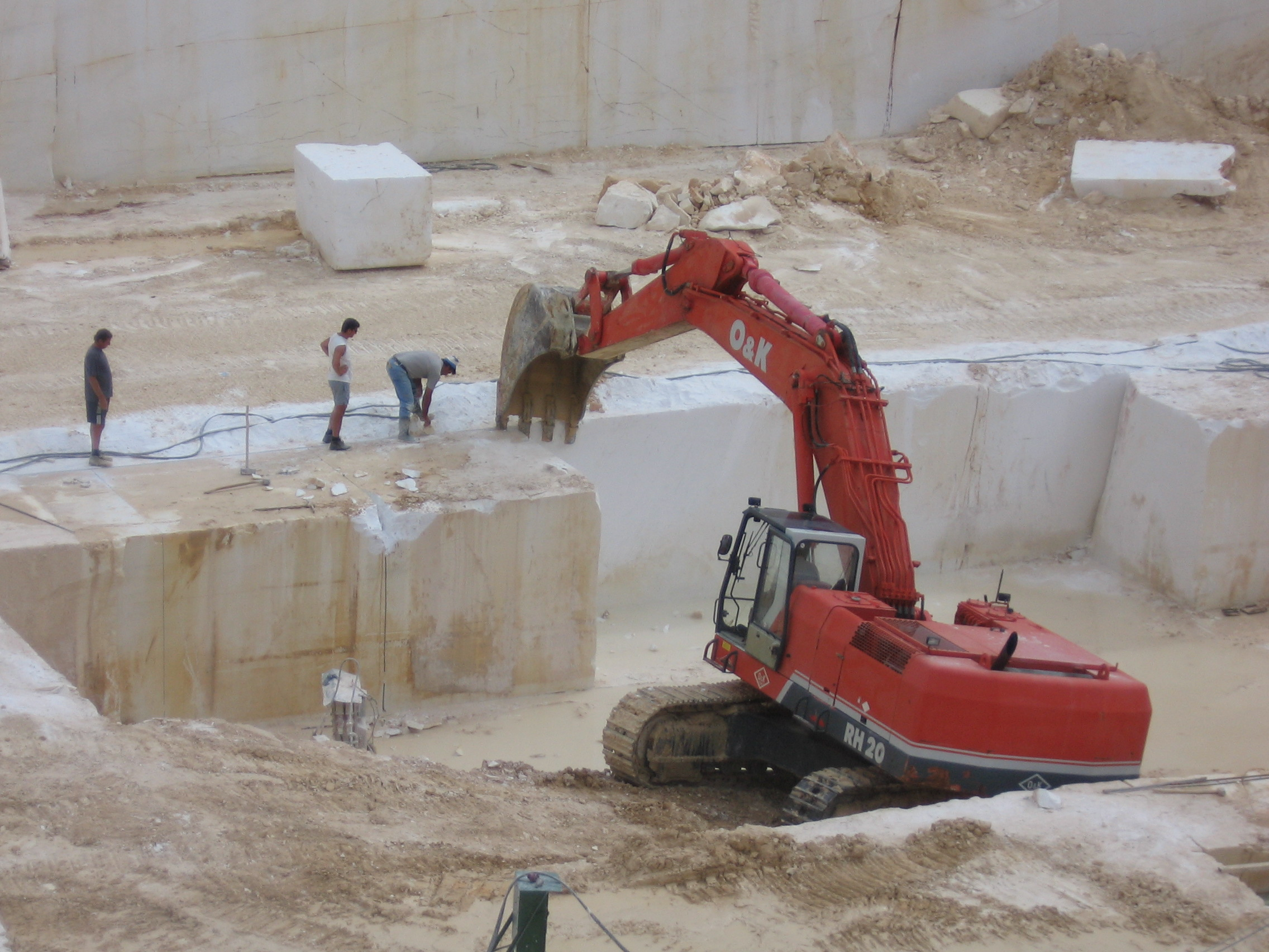 Marmorbruch bei Limenas